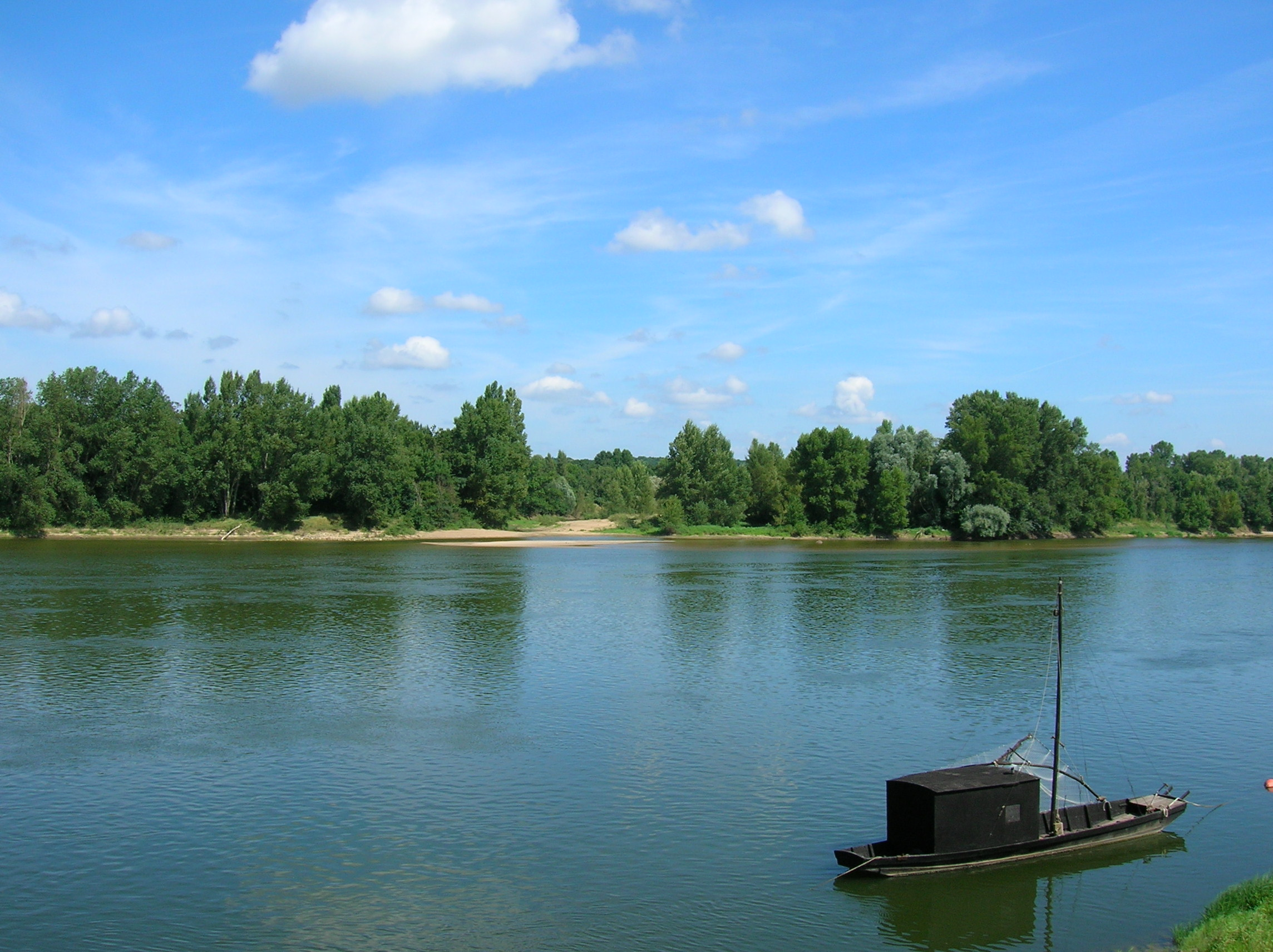 La loire a Bréhémont avec un bateau traditionnel